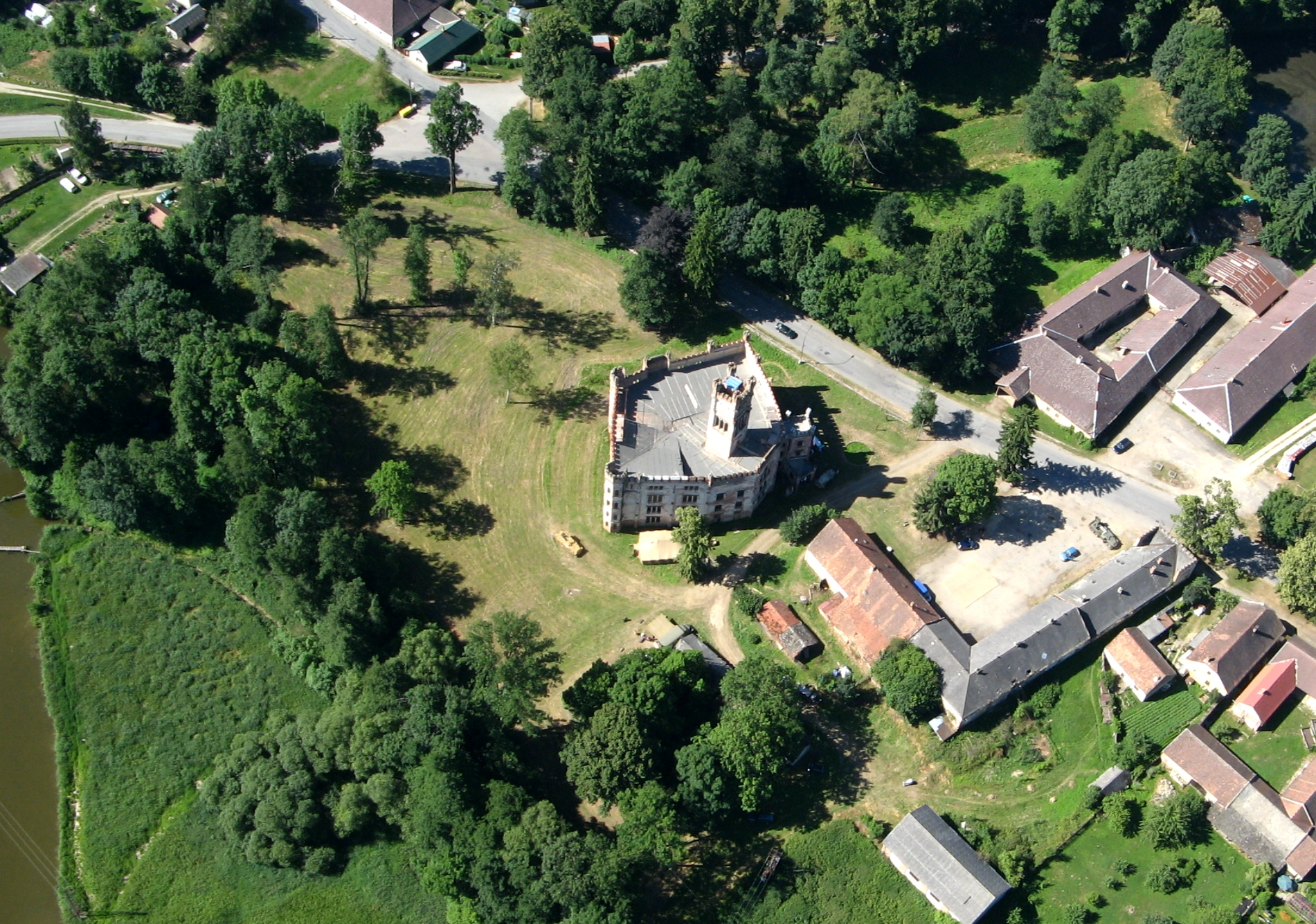 Zámek Český Rudolec, Český Rudolec 1